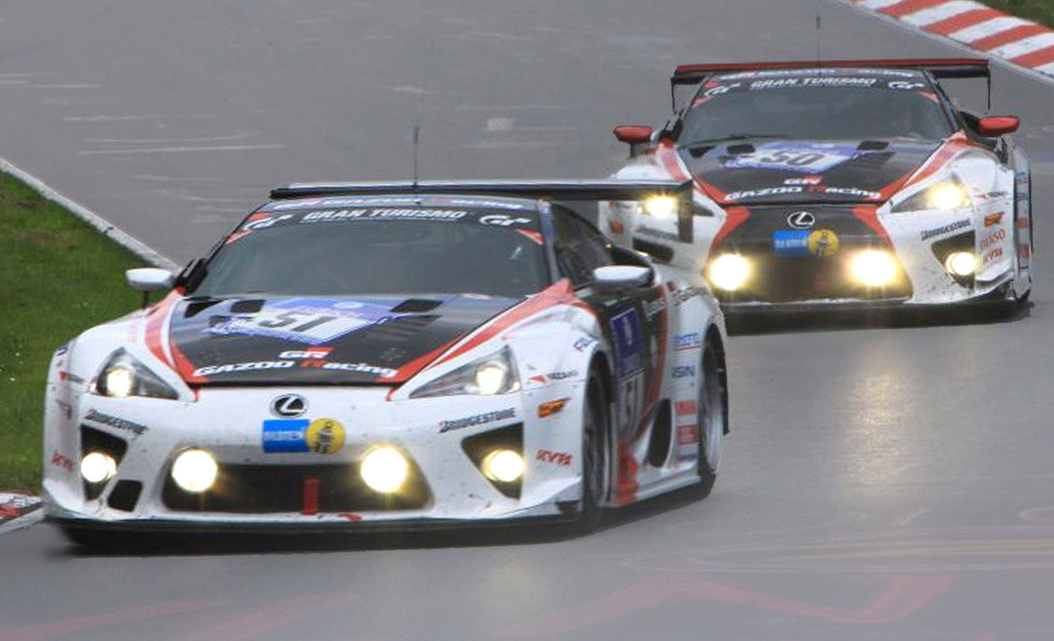 Lexus LF-A